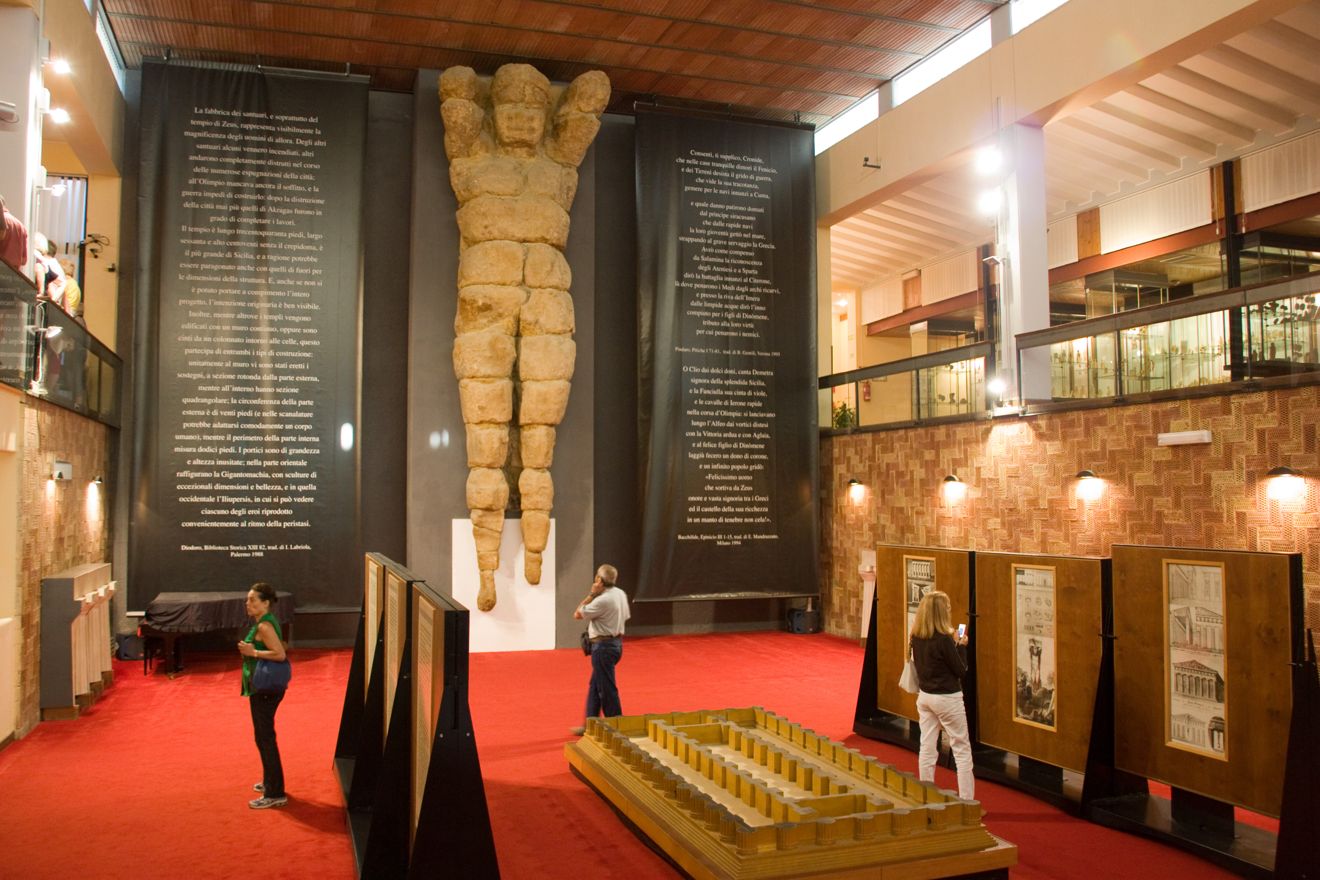 Museo Archeologico (Musée Archéologique) , Agrigento , Sicile, Italie